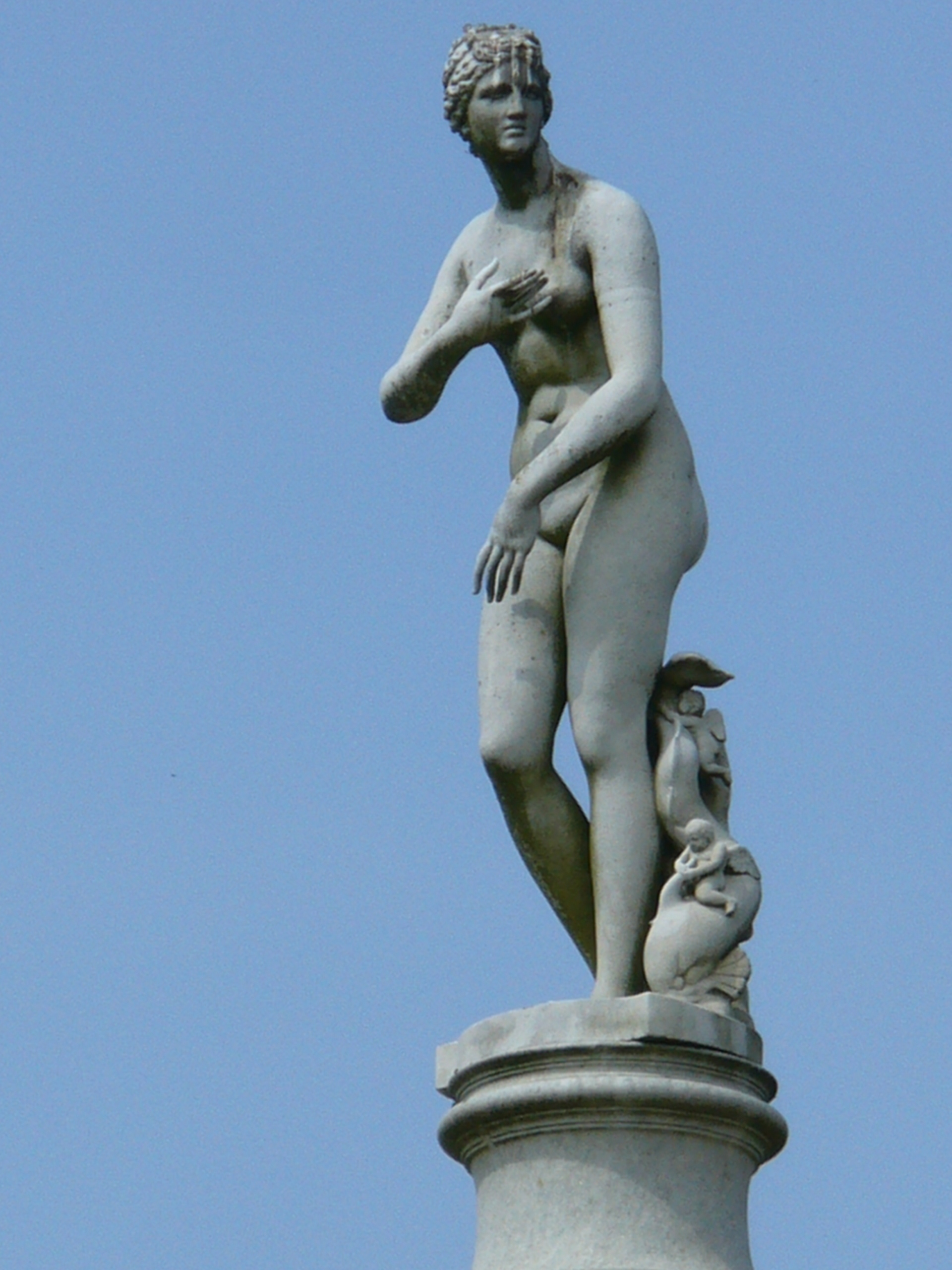 Dem Bade entstiegene Venus(Aphrodite) von Medici(1843)auf Säulenkapitell-Mittlerer Lustgarten-Sanssouci